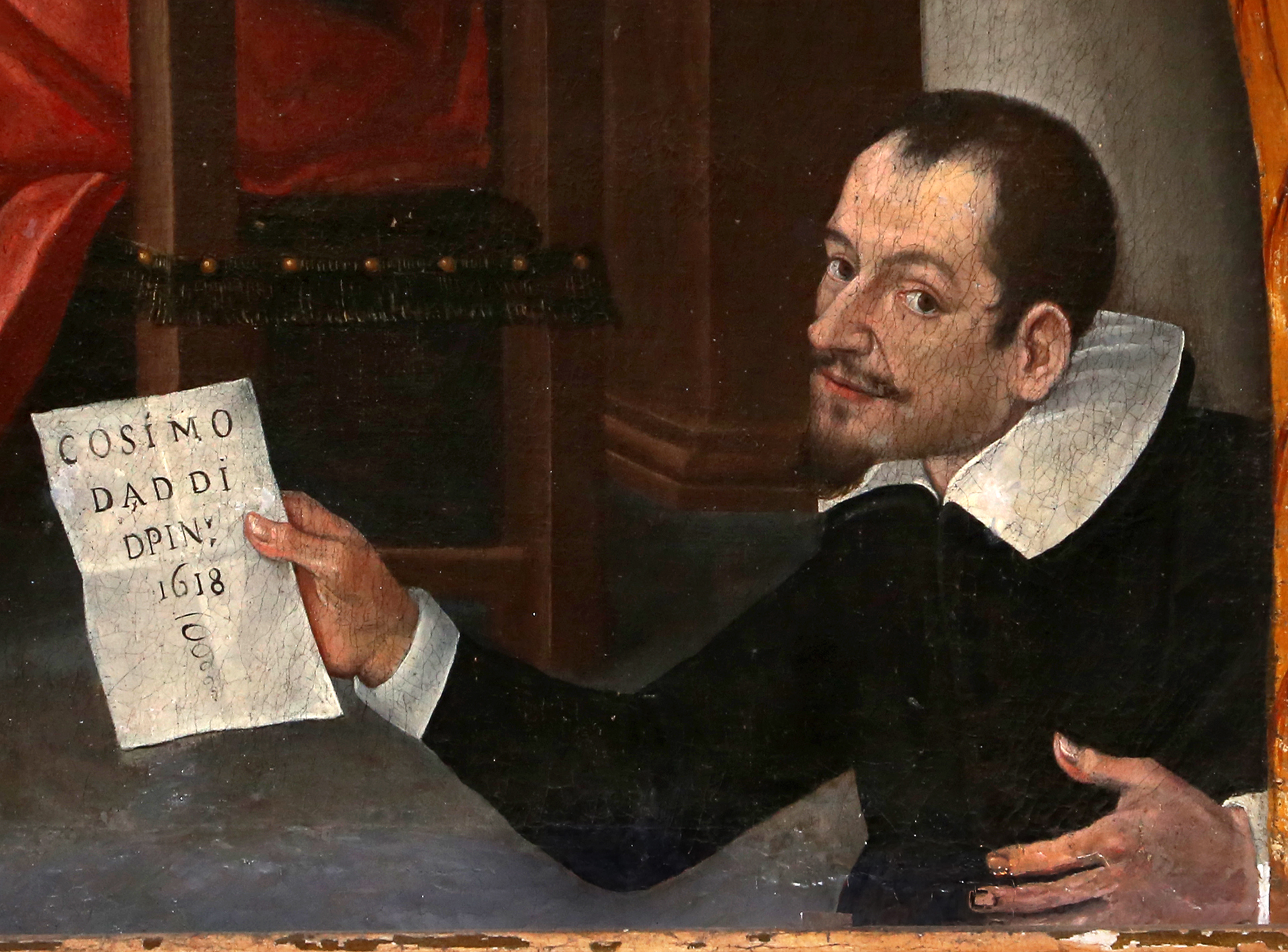 chiesa di San Lino This is a photo of a monument which is part of cultural heritage of Italy.